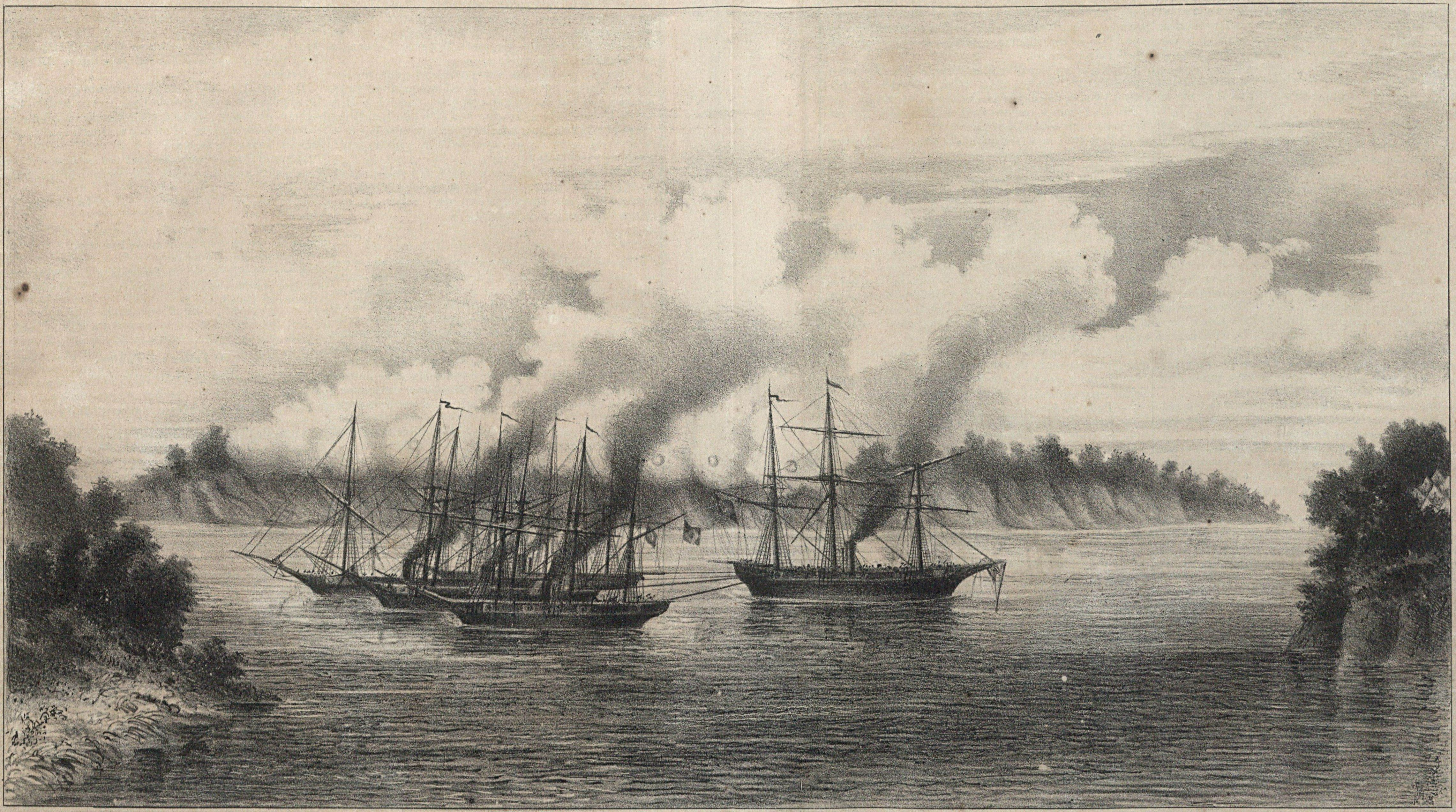 A canhoneira Iguatemy (commandante Tamborim) no alto Paraná salvando no dia 7 de Novembro de 1868 a lancha a vapor Pimentel, que foi a pique, e na qual morreu o capitão de mar e guerra Guilherme José dos Santos e cinco praças. (Este desenho foi-nos remettido pelo capitão tenente Rodrigues Pinto.)